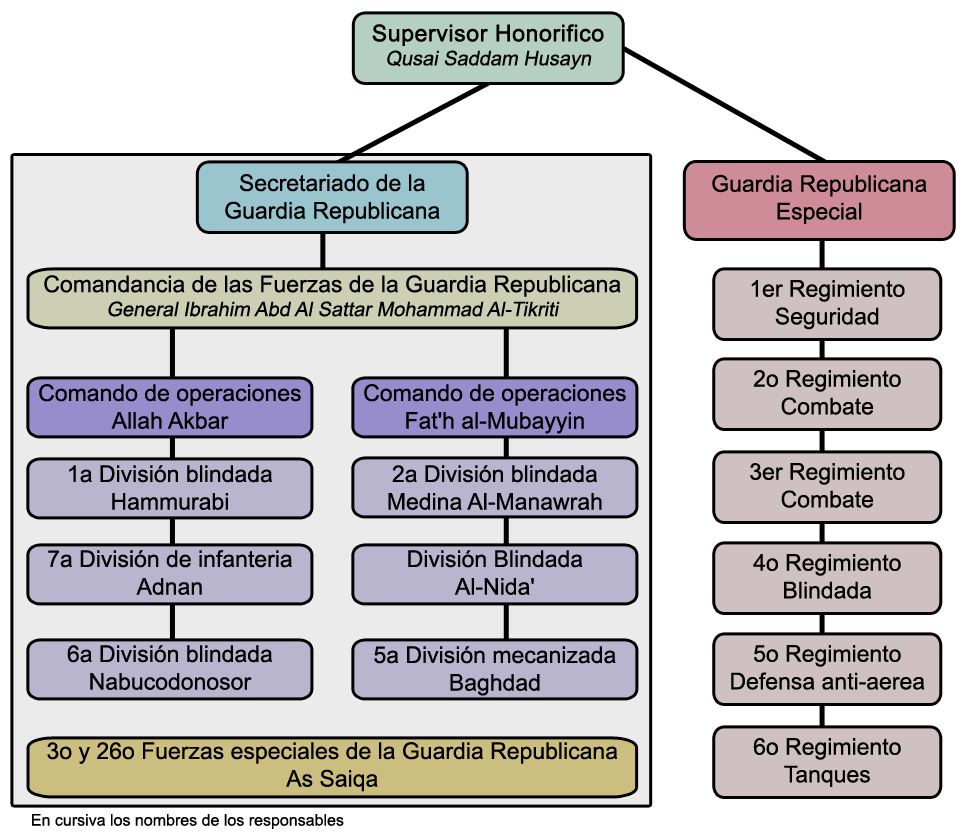 Esquema de la Guardia Republicana iraquí. Se incluyen los nombres de algunos cargos superiores.